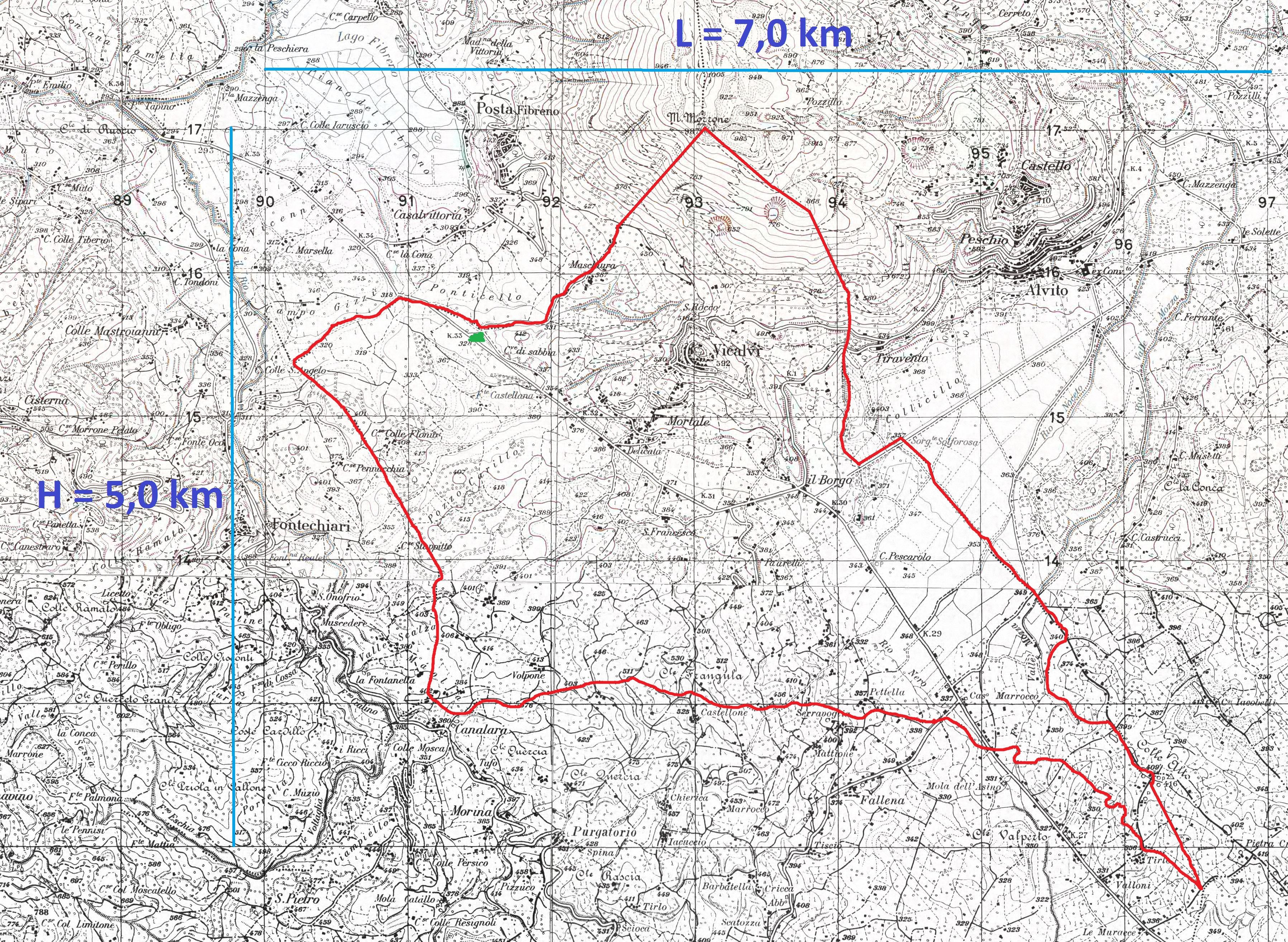 Cartina 1:25000 del territorio comunale del comune di Vicalvi (FR), Italia.